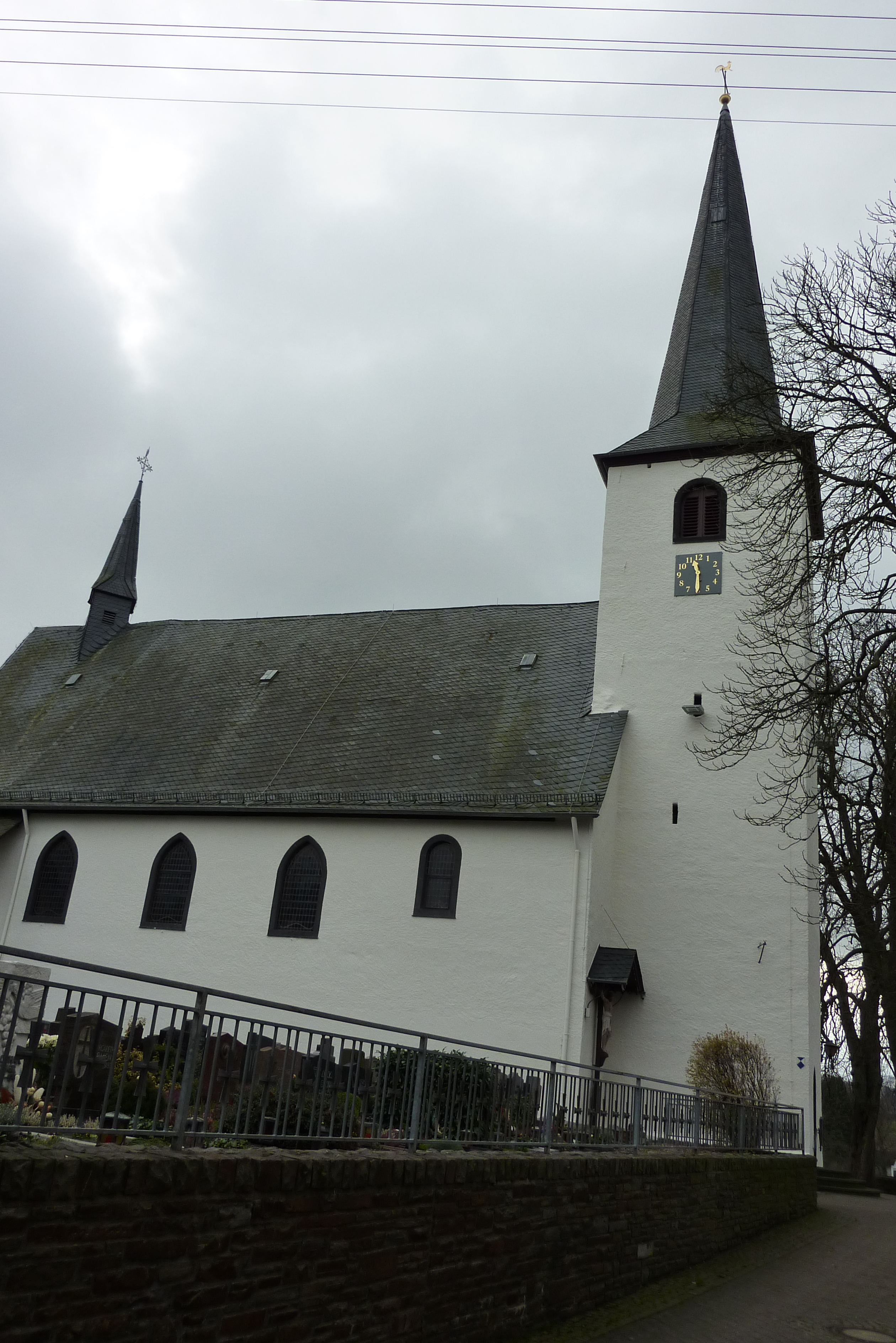 katholische Pfarrkirche St. Johannes der Täufer in Alflen, Außenansicht